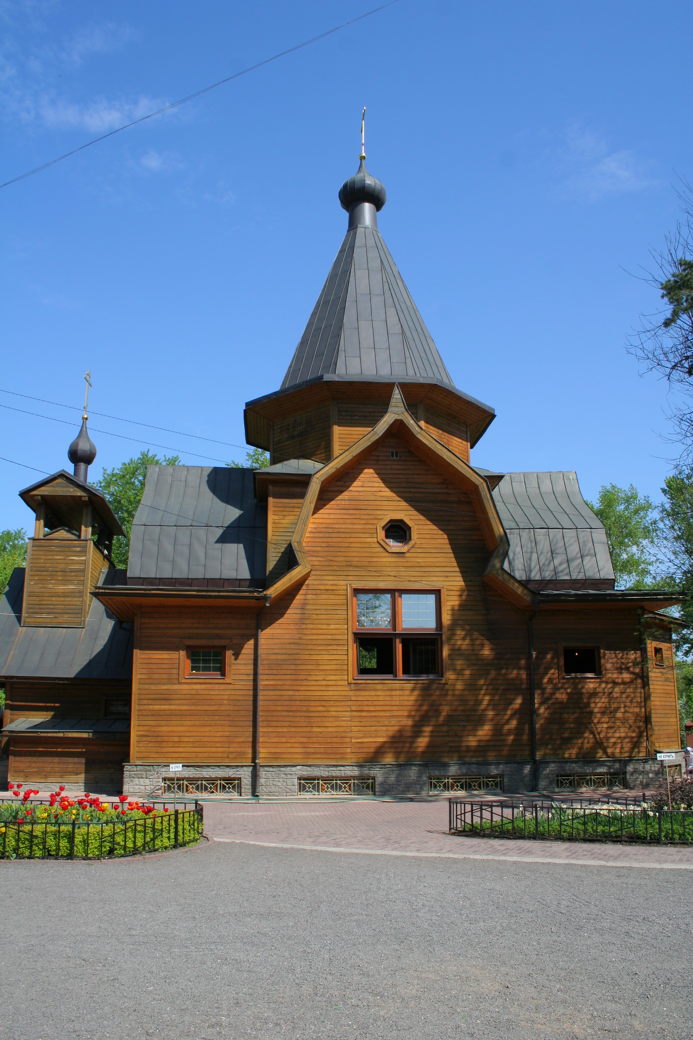 Kirche des Heiligen Nikolaus an der Strohhütte in Moskau